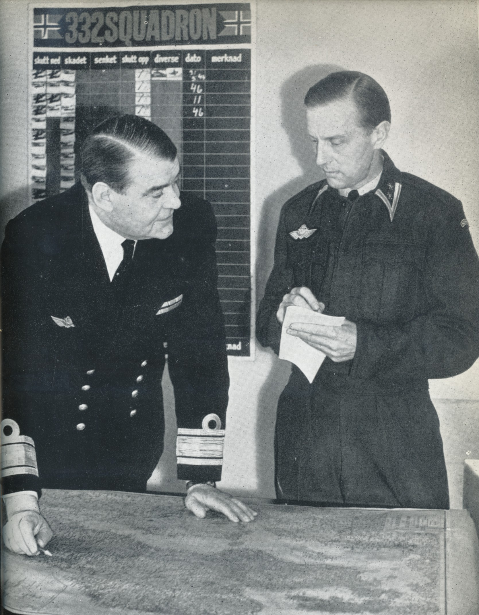 Hjalmar Riiser-Larsen og hans stabssjef Birger F. Motzfeldt